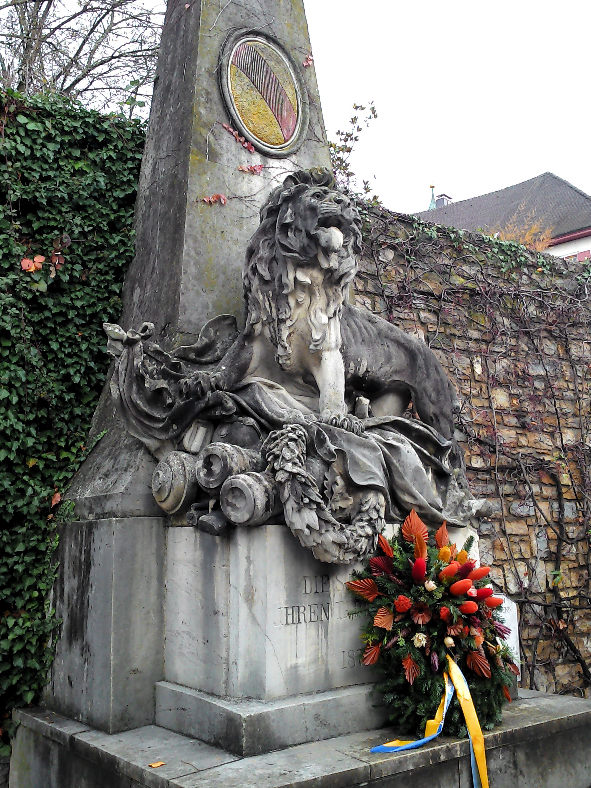 Waldshut-Tiengen, Denkmal für die Gefallenen des Krieges 1870/71.